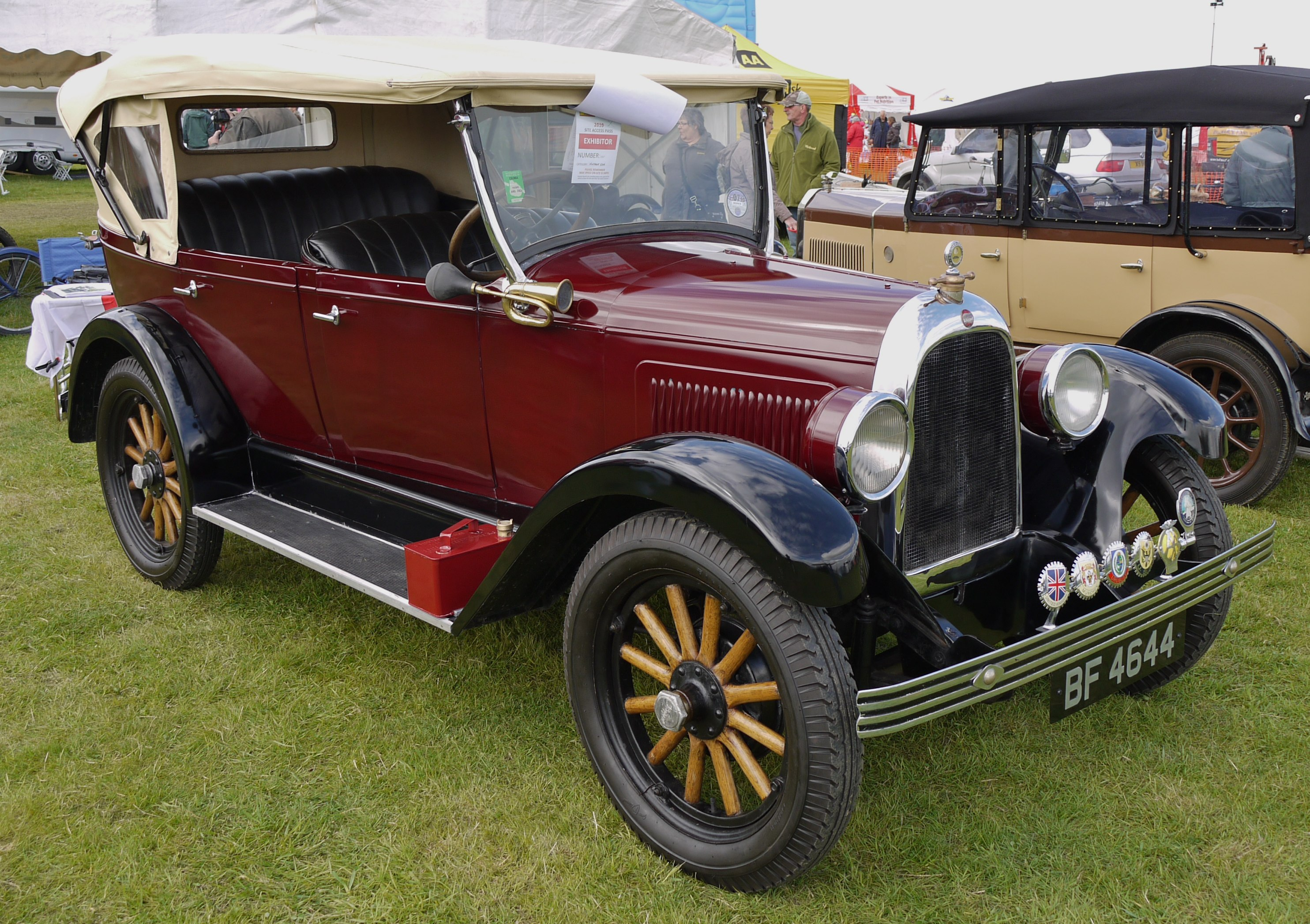 Panasonic G1 14-45 Lens